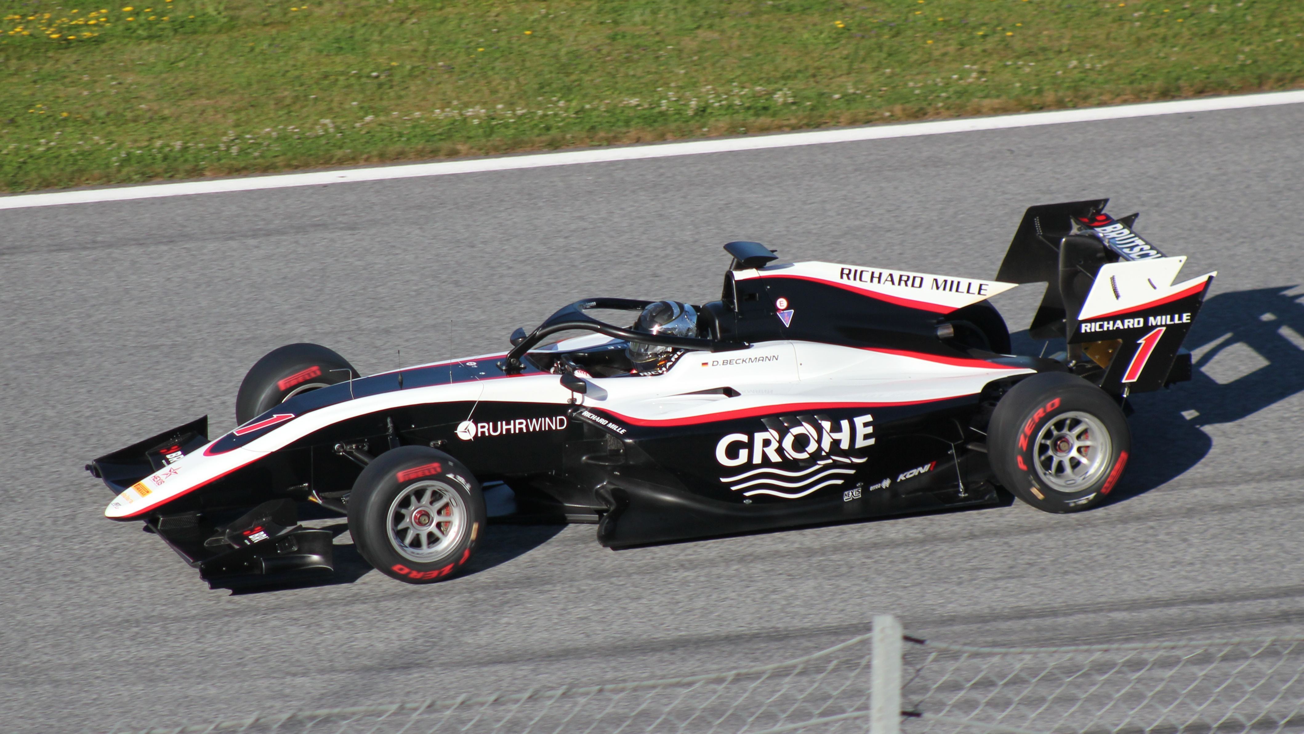 Beckmann beim Rennwochenende in Österreich 2019